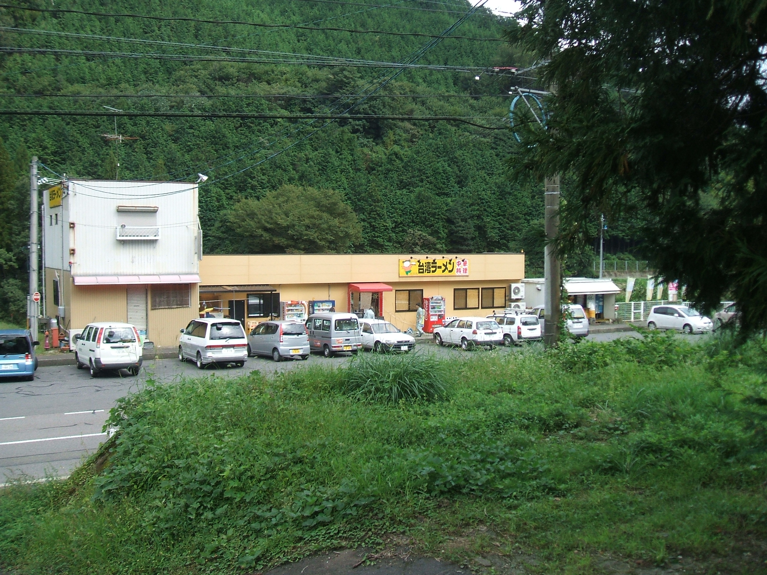 ホームより国道156号線を見る。